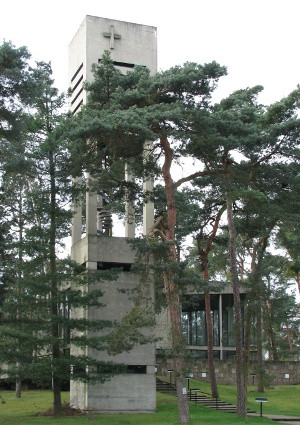 Pfingstbergkirche in Mannheim-Pfingstberg.